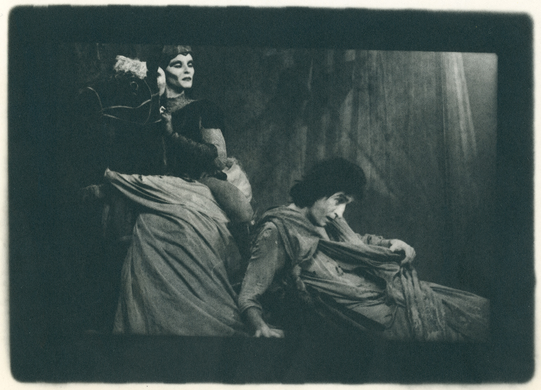 Bolek Polívka a Chantal Poullain v představení "Šašek a královna"